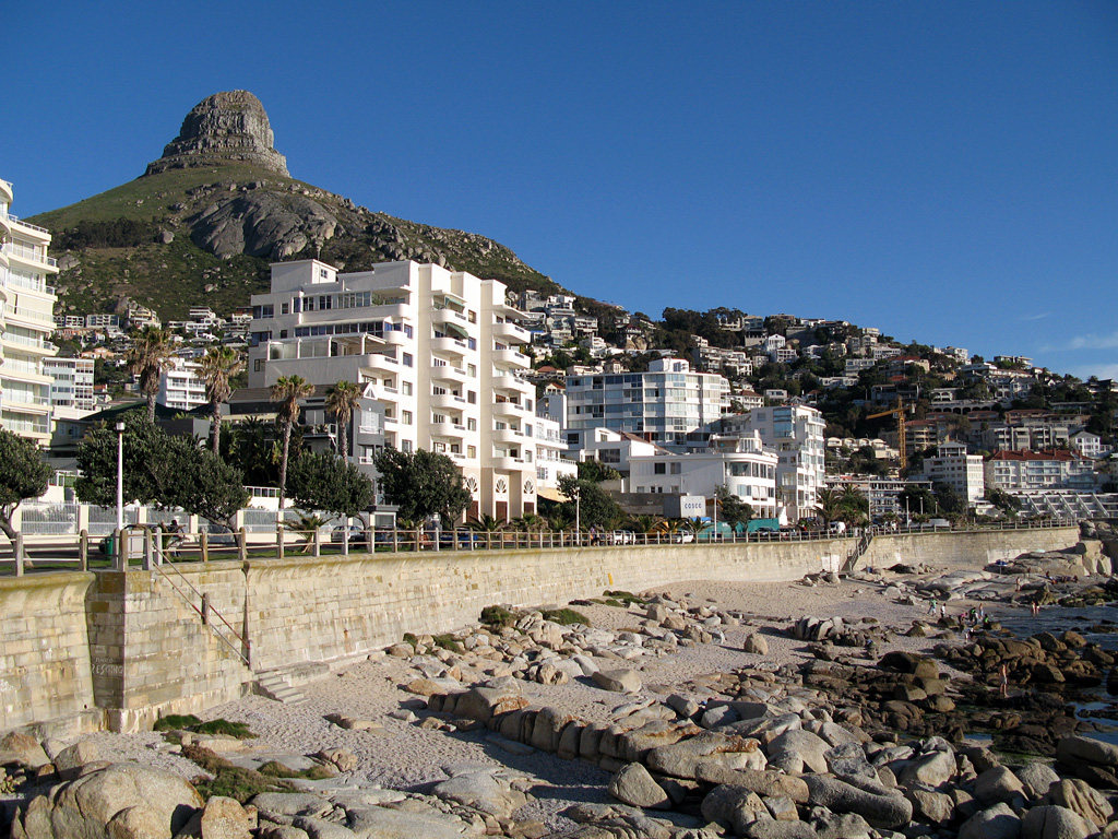 Bantry Bay